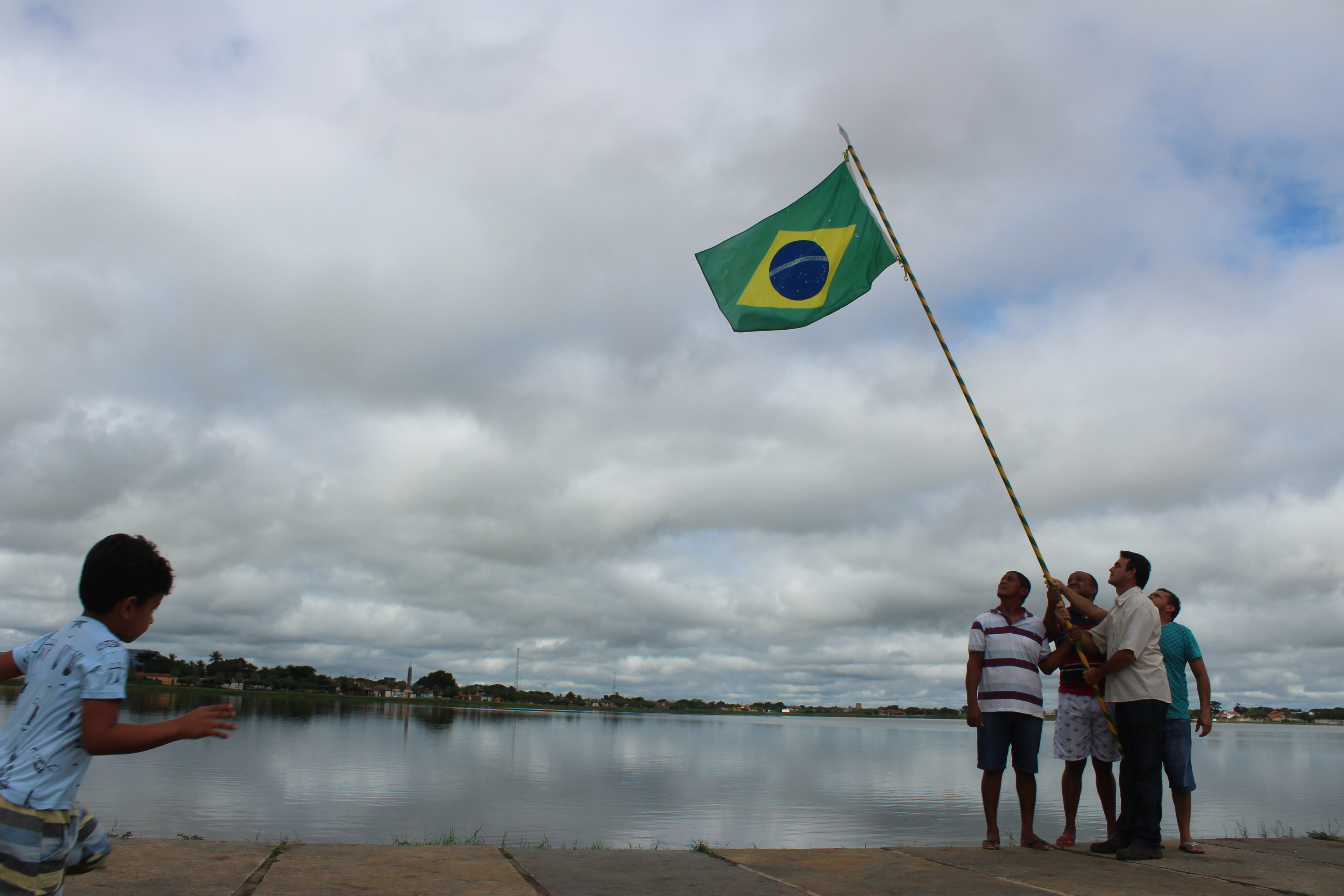 Populares levantando a Bandeira do Brasil em um mastro decorado as margens do Acude Grande de Campo Maior.